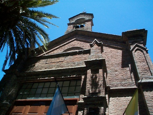 Iglesia de Glew